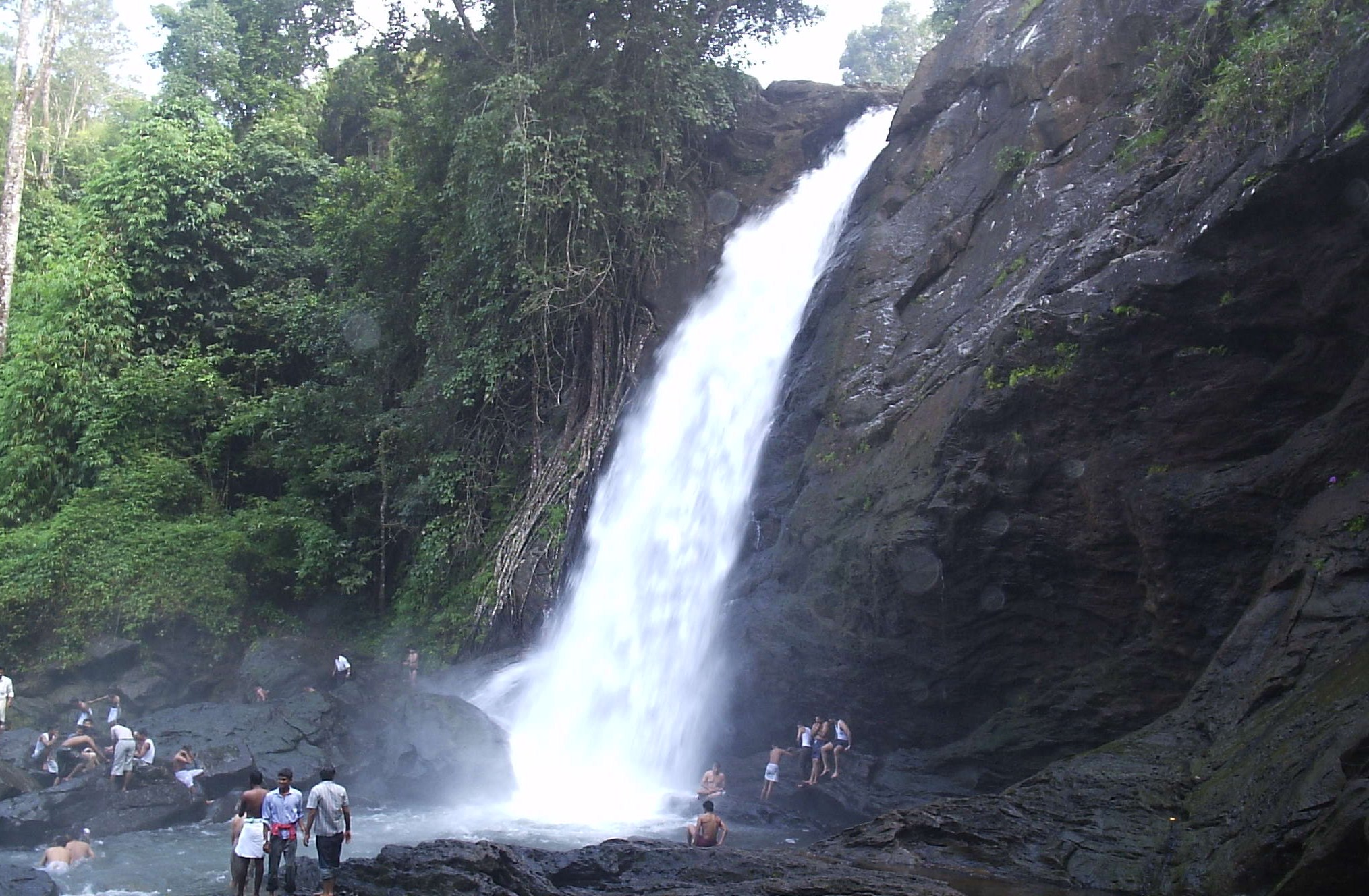 സൂചിപ്പാറ വെള്ളച്ചാട്ടത്തിന്റെ ഒരു ദൃശ്യം